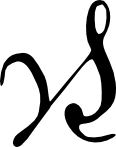 Greek ligature -ger- (γερ) in medieval minuscule handwriting